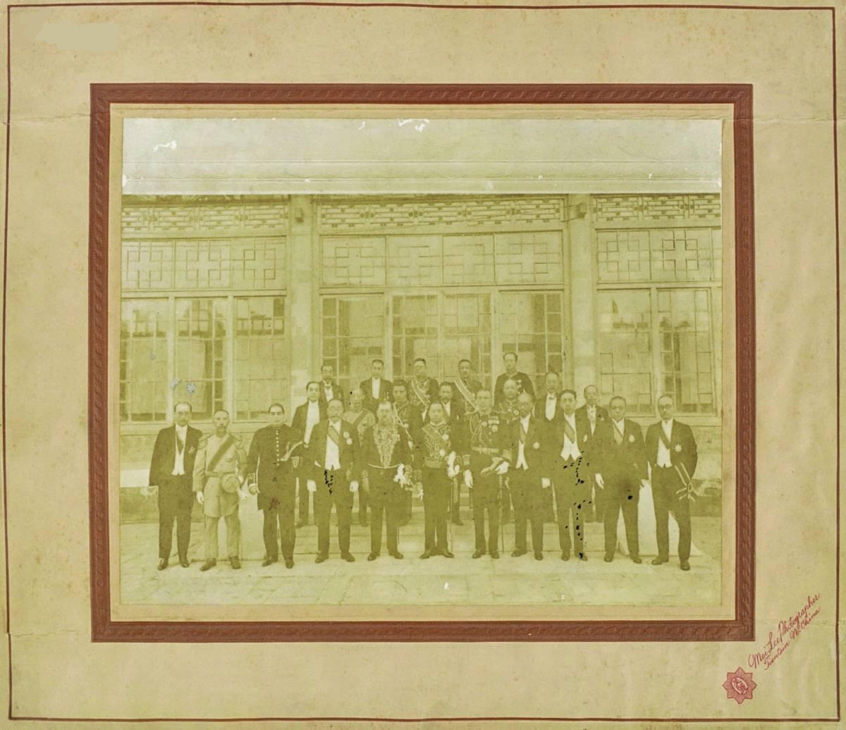 是为唐山交大教授吴采人旧藏顾维钧内阁成员合影。照片内有国务总理兼外交总长顾维钧（中）、财政总长汤尔和（前排右四）、海军总长杜锡珪（前排右五）、司法行政部长罗文干（前排右三）、教育总长任可澄（前排左四）、内务总长胡惟德、陆军总长张景惠、农商总长杨文恺、交通总长潘复等内阁成员。1927年美丽照相馆摄，装裱在背板上，蛋白纸基，保存完好。吴采人（1881-1937），名汉声，字采人，号莽庐，桥镇人，清末邑庠生。曾任南洋公学、交通大学、唐山大学、北京民国大学教授，交通部视学等职务，晚年与王清穆、杜少如等人创办地方实业。吴擅长诗词书画，著有《莽庐词稿》、《词学概论》、《浙东游记》等书。